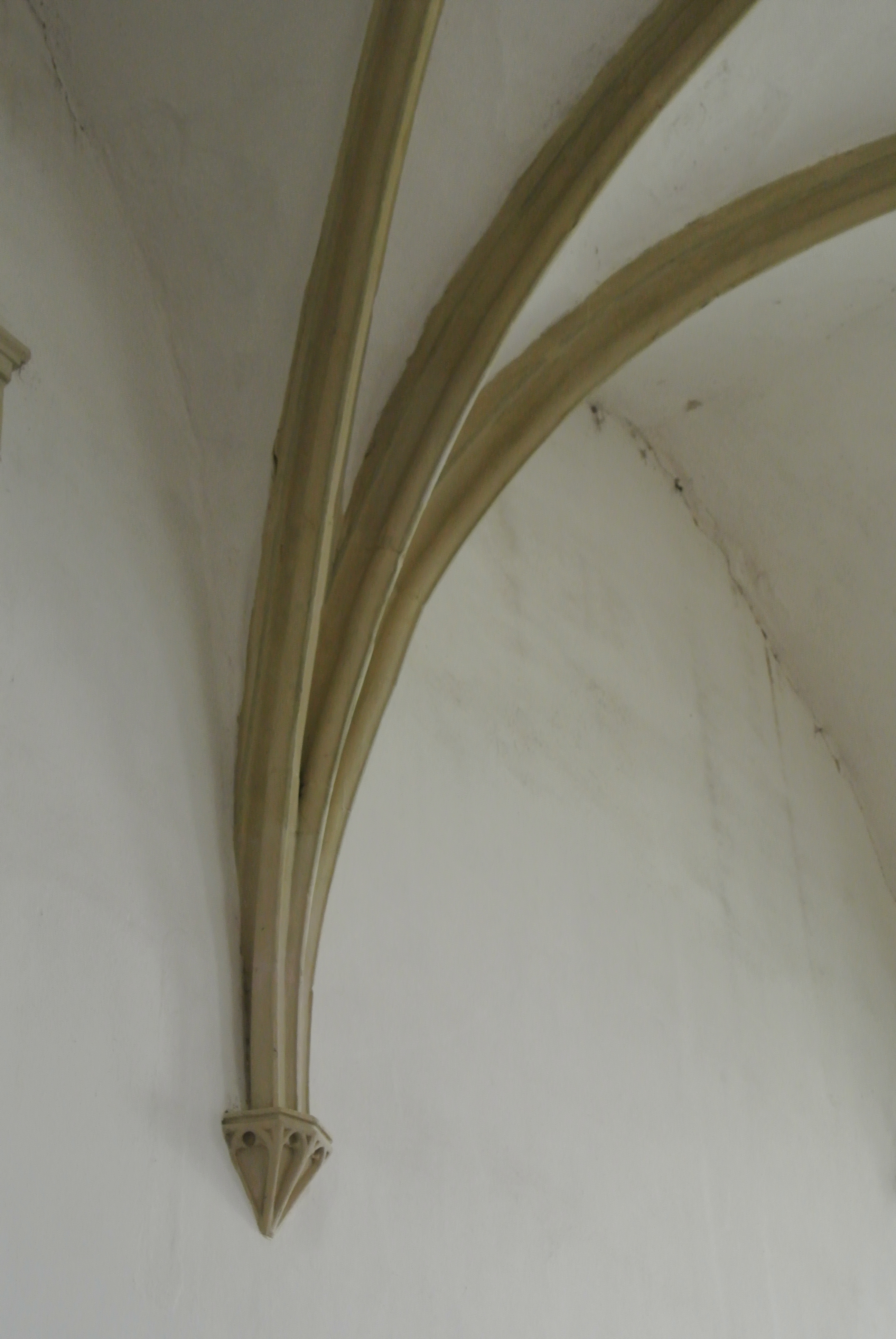 Detaily kostela v Charvatcích